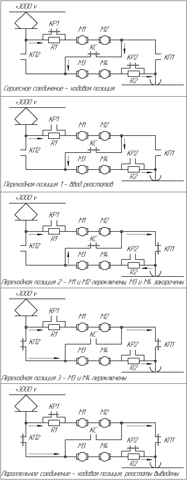 Схема переключения соединений ТЭД в РКСУ